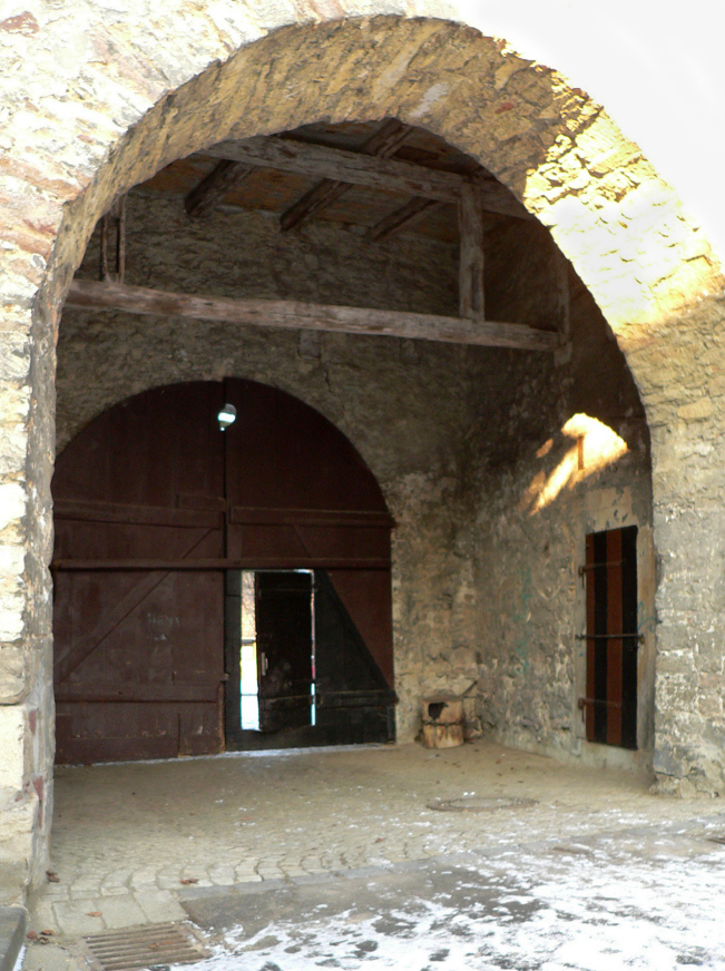 Tordurchfahrt der Burg Gebhardshagen